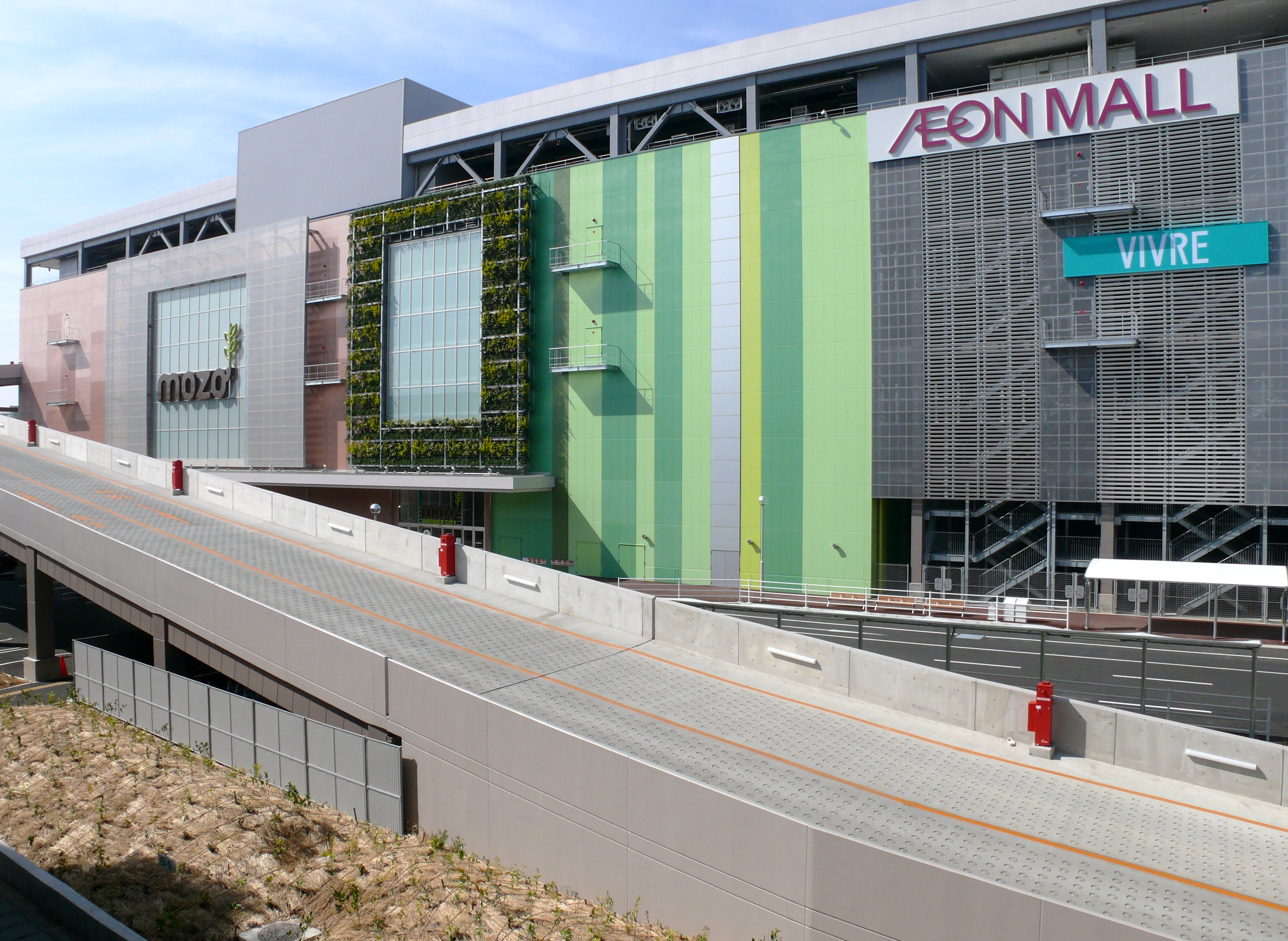 イオングループのショッピングセンター「MOZO（モゾ）ワンダーシティ（旧イオンモール名古屋ワンダーシティ」